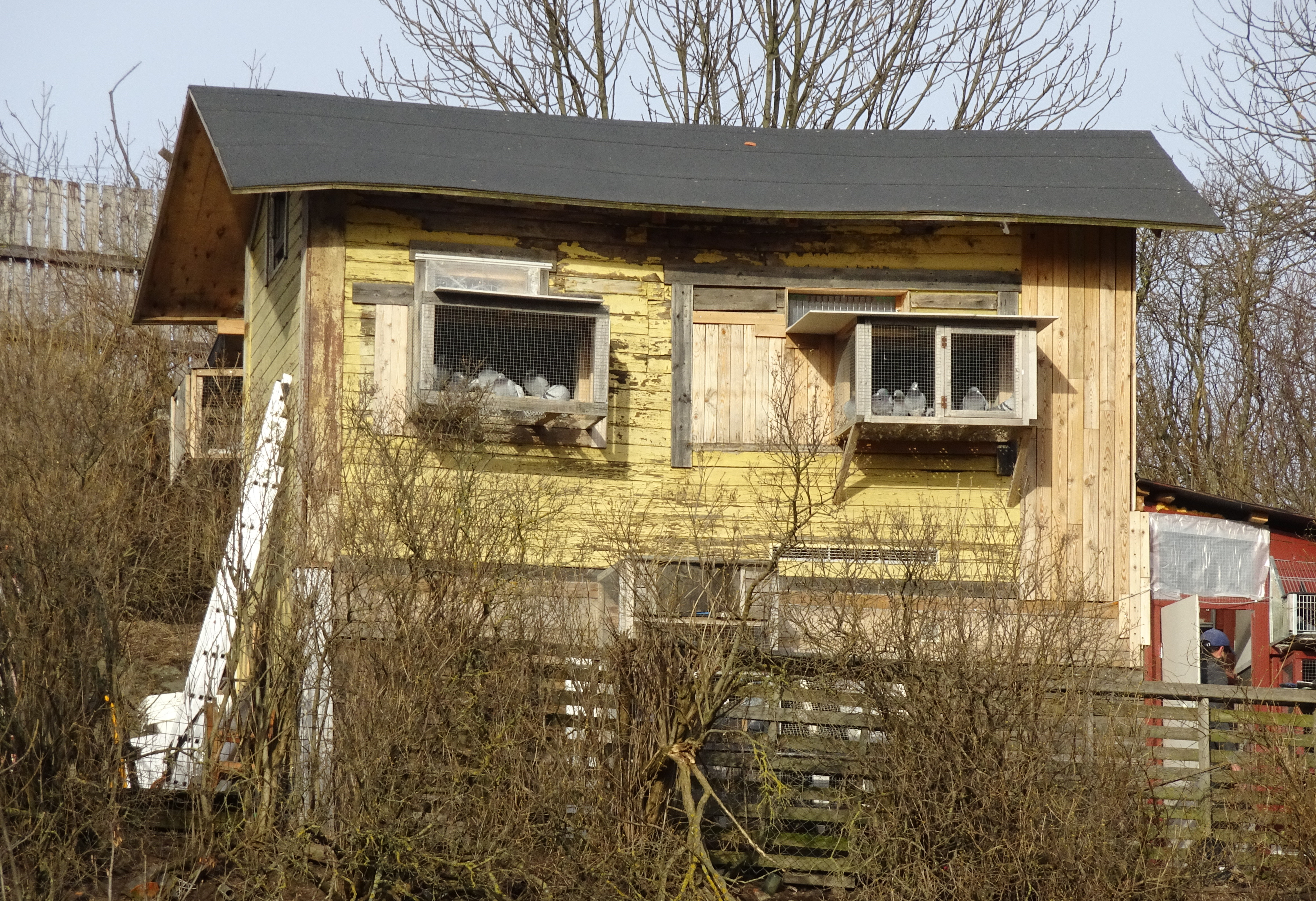 Stockholms brevduveklubb